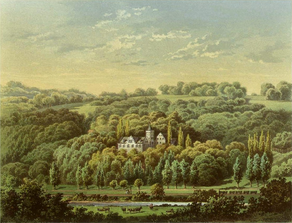 Haus Mallinckrodt, Kreis Hagen, Provinz Westphalen